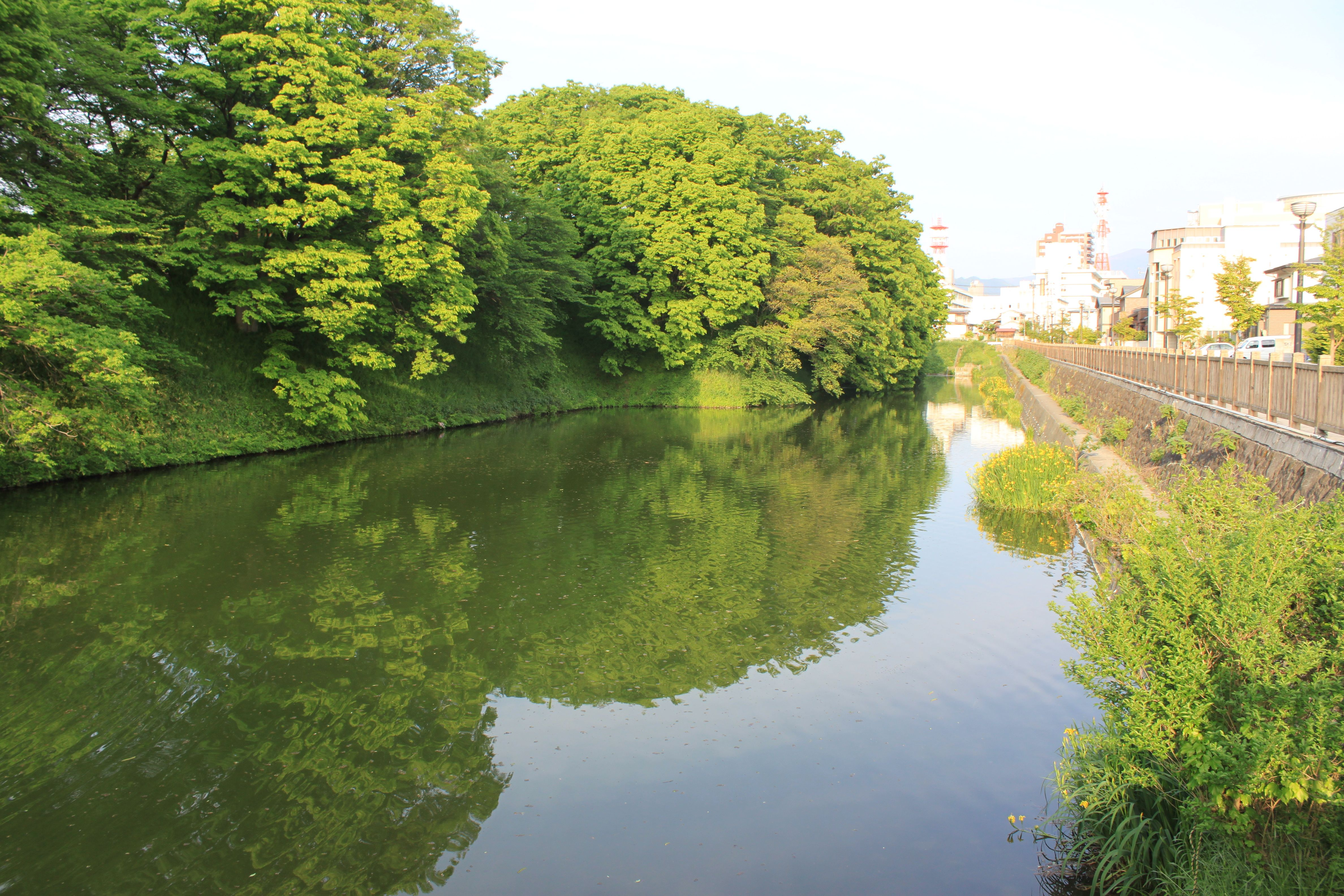 霞城公園（山形城址）